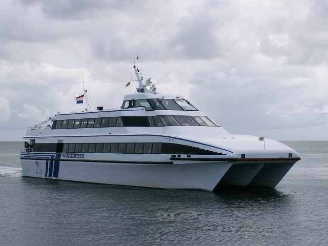 Koegelwieck bij vlieland op zee